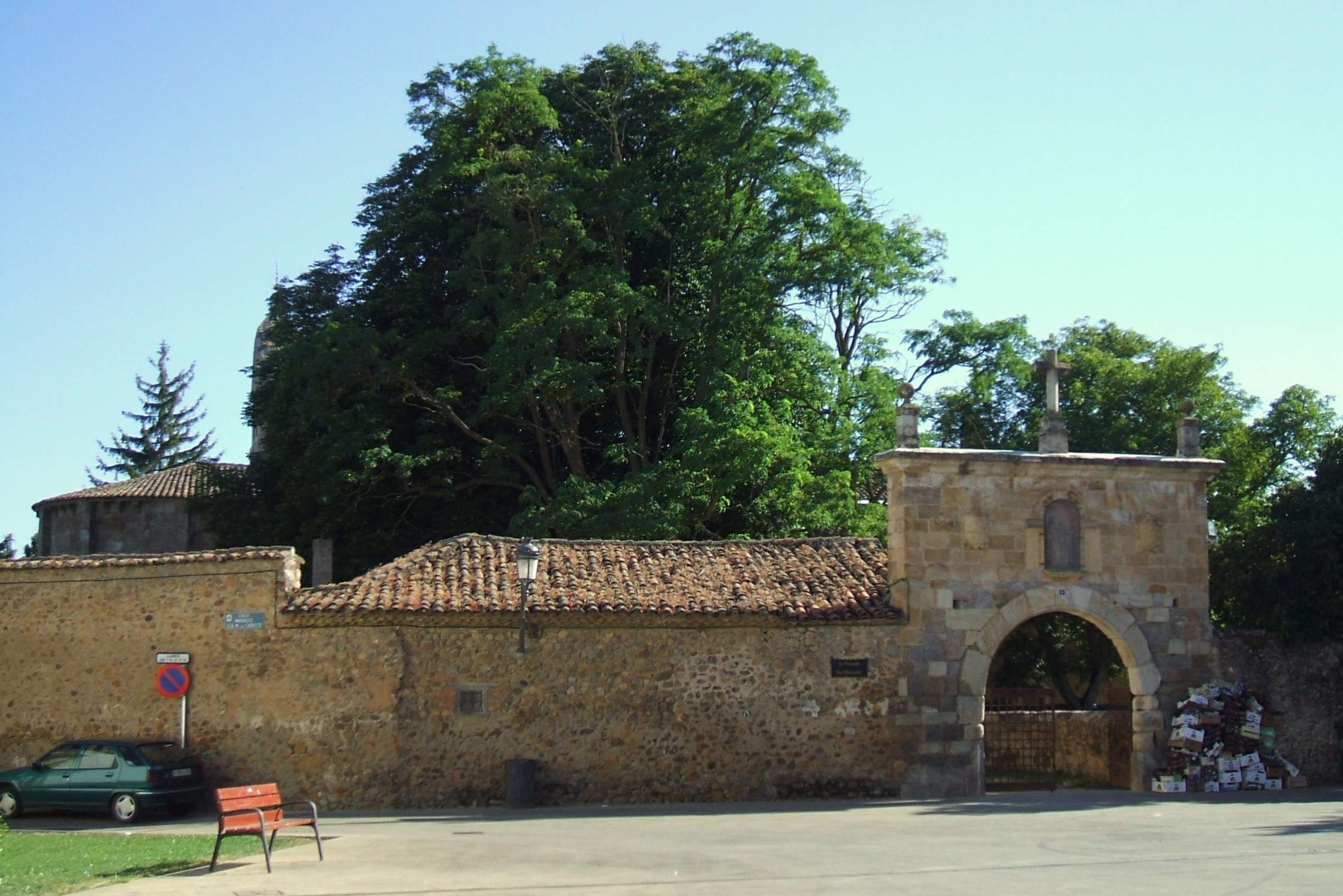 Monasterio trapense de Santa María de Carrizo, en Carrizo de la Ribera (León)